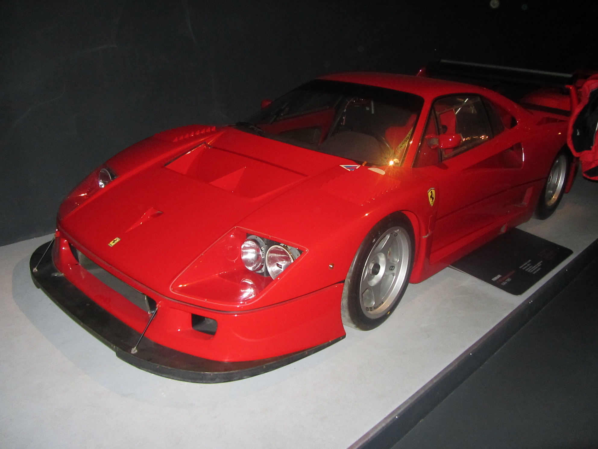 il modello di serie è nato nel 1987 e aveva 478cv; questa versione "Competizione" dispone di 700cv. Ferrari F40 (competizione), Italia: Motore: 8 cilindri a V di 90° Cilindrata: 2.936 cmc Potenza: 700 cv Museo dell'automobile di Torino donato da Galleria Ferrari, Maranello